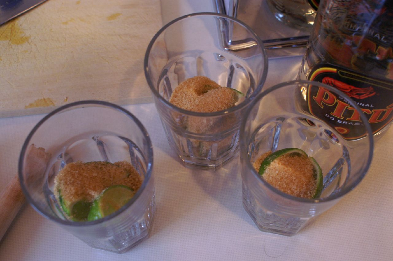 Rohrzucker in Gläsern (Vorbereitung für Caipirinha)